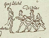 Ausschnitt aus dem Kunzschen Riss, den E. T. A. Hoffmann 1815 an seinen Bamberger Verleger Kunz schickte